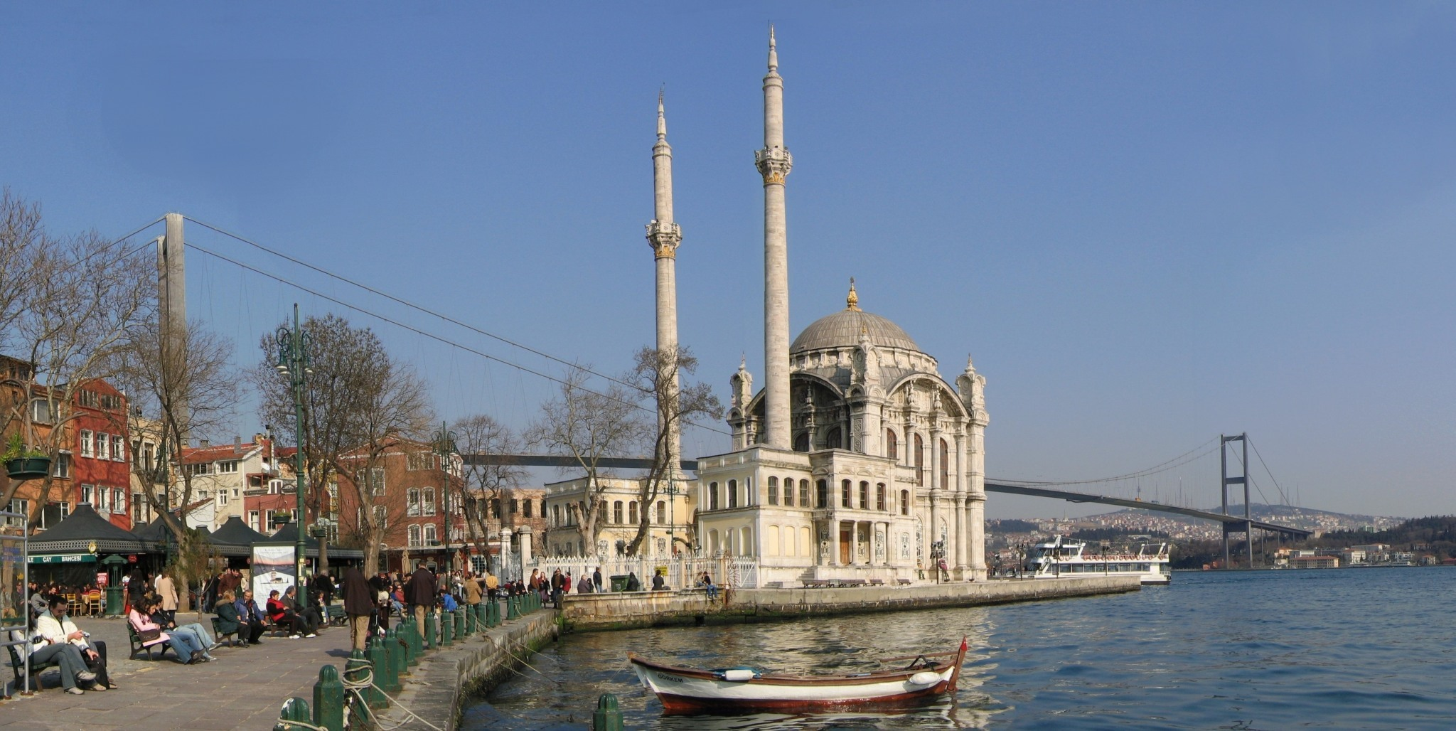 Istanbul: Künstlerviertel Ortaköy und die 1. Bosporusbrücke im Hintergrund, selbst fotografiert im März 2005, GNU-FDL